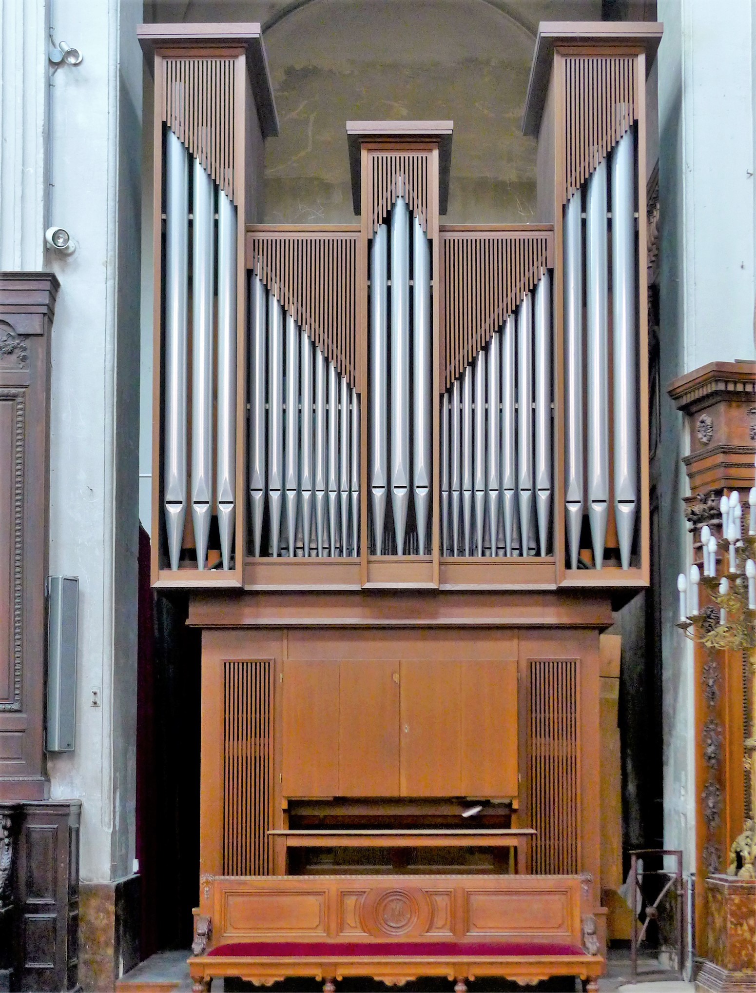 Église Notre-Dame-des-Blancs-Manteaux (orgue de choeur) - Paris IV